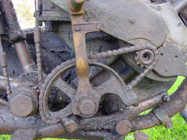 Een vroege vorm van een kickstarter op een P&M uit 1919. Via een startkettinkje wordt rechtstreeks de krukas rond getrapt...